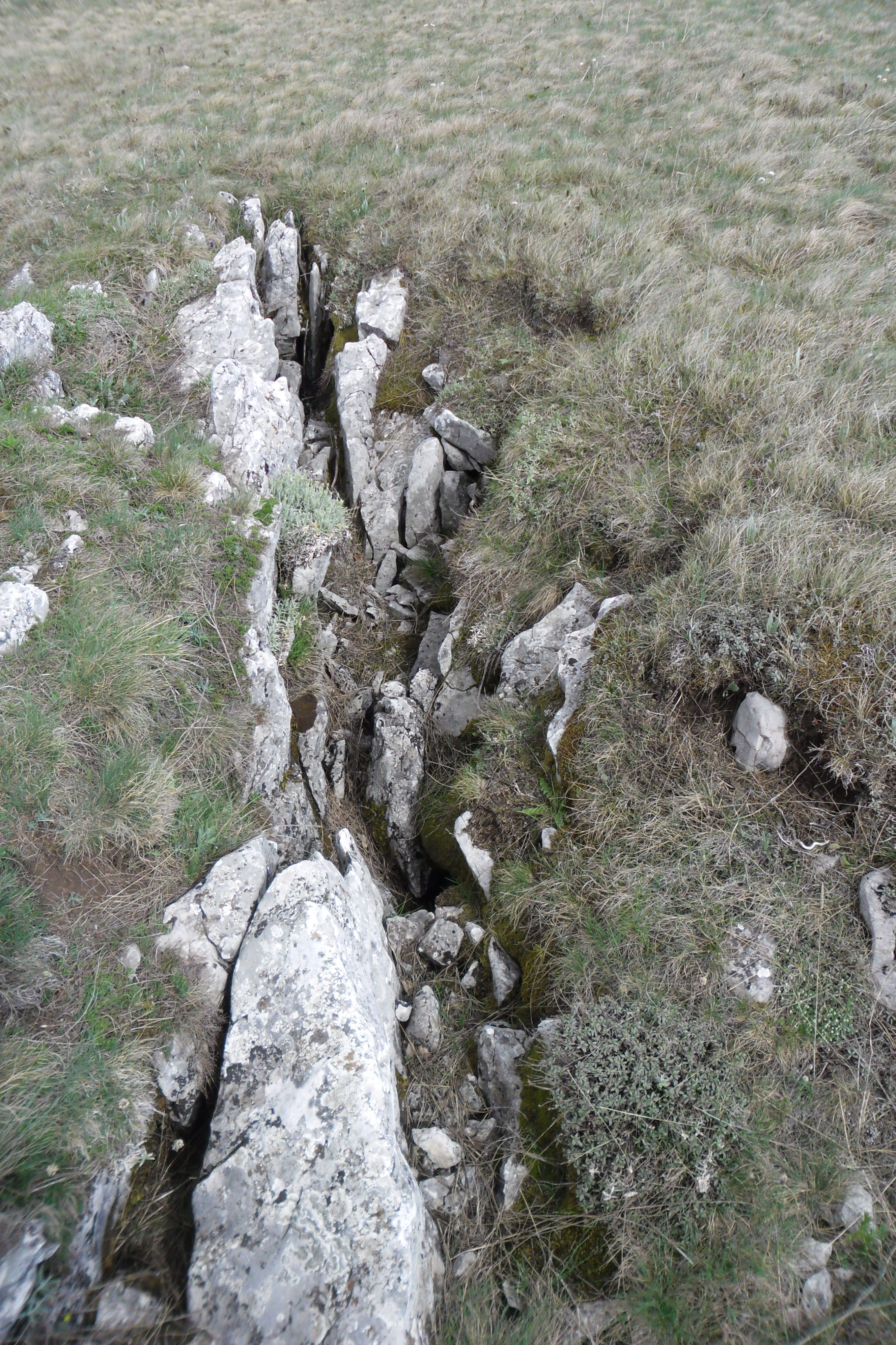 Карст